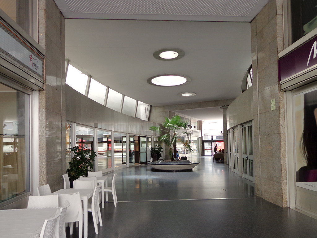 Milano, la galleria interna del cosiddetto "palazzo di Fuoco".